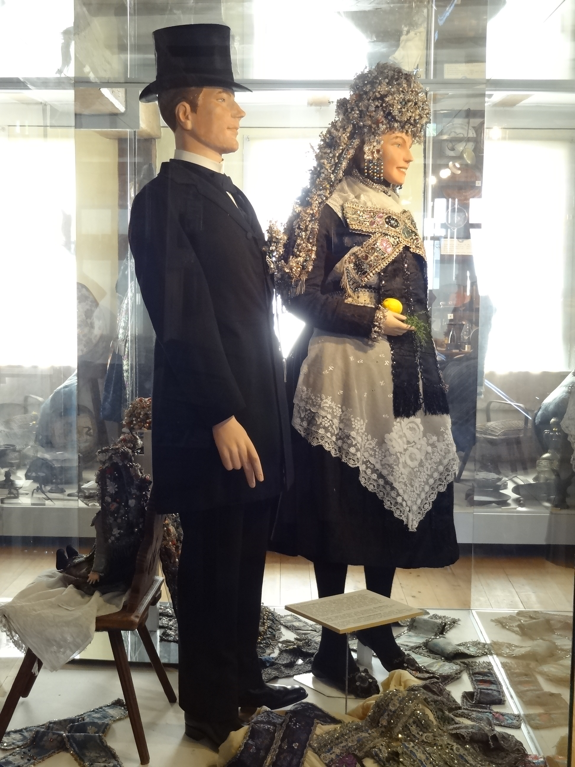 Hüttenberger Heimatmuseum, Brautschmuck